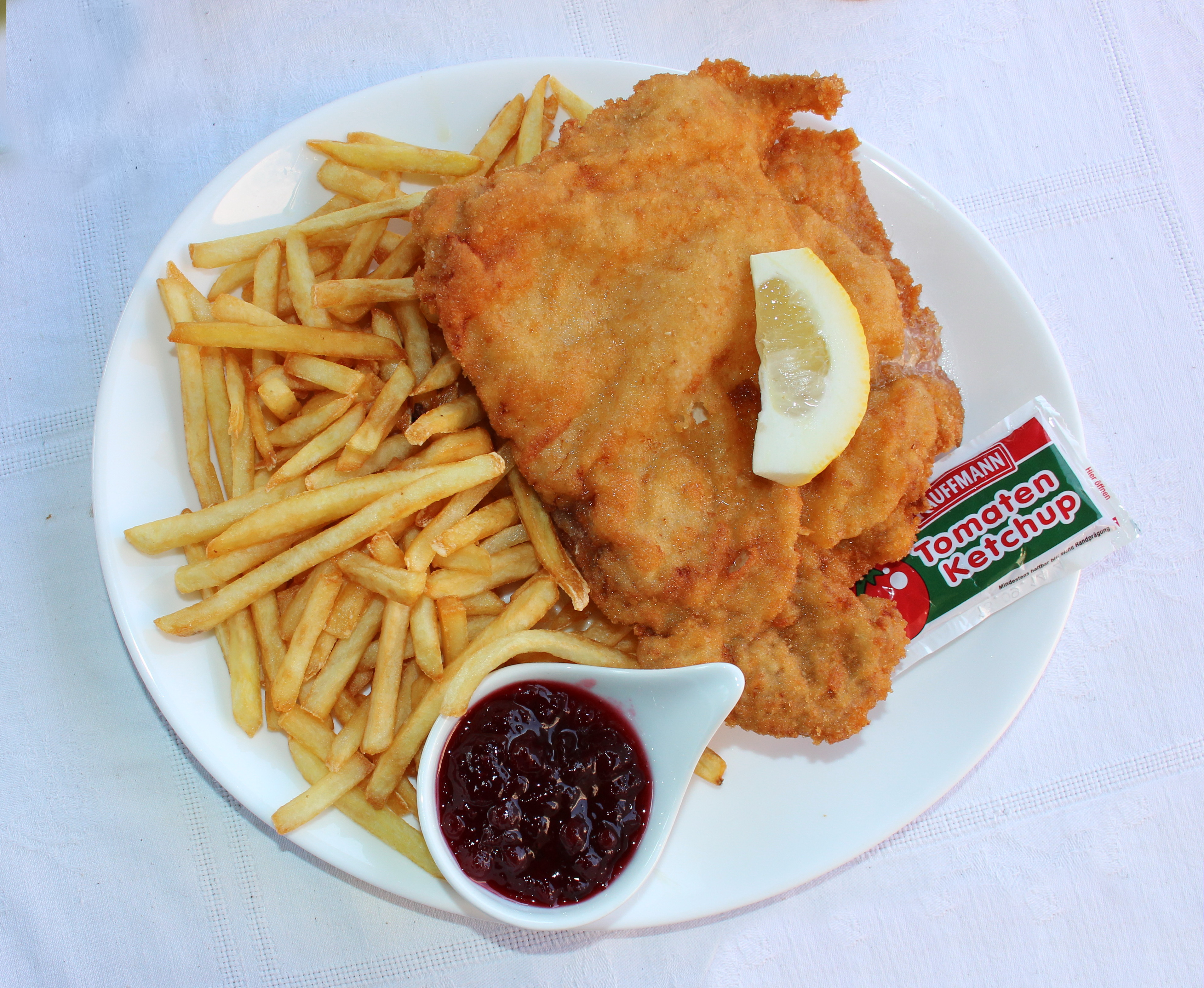 Cordon bleu mit Pommes frites und Preiselbeeren